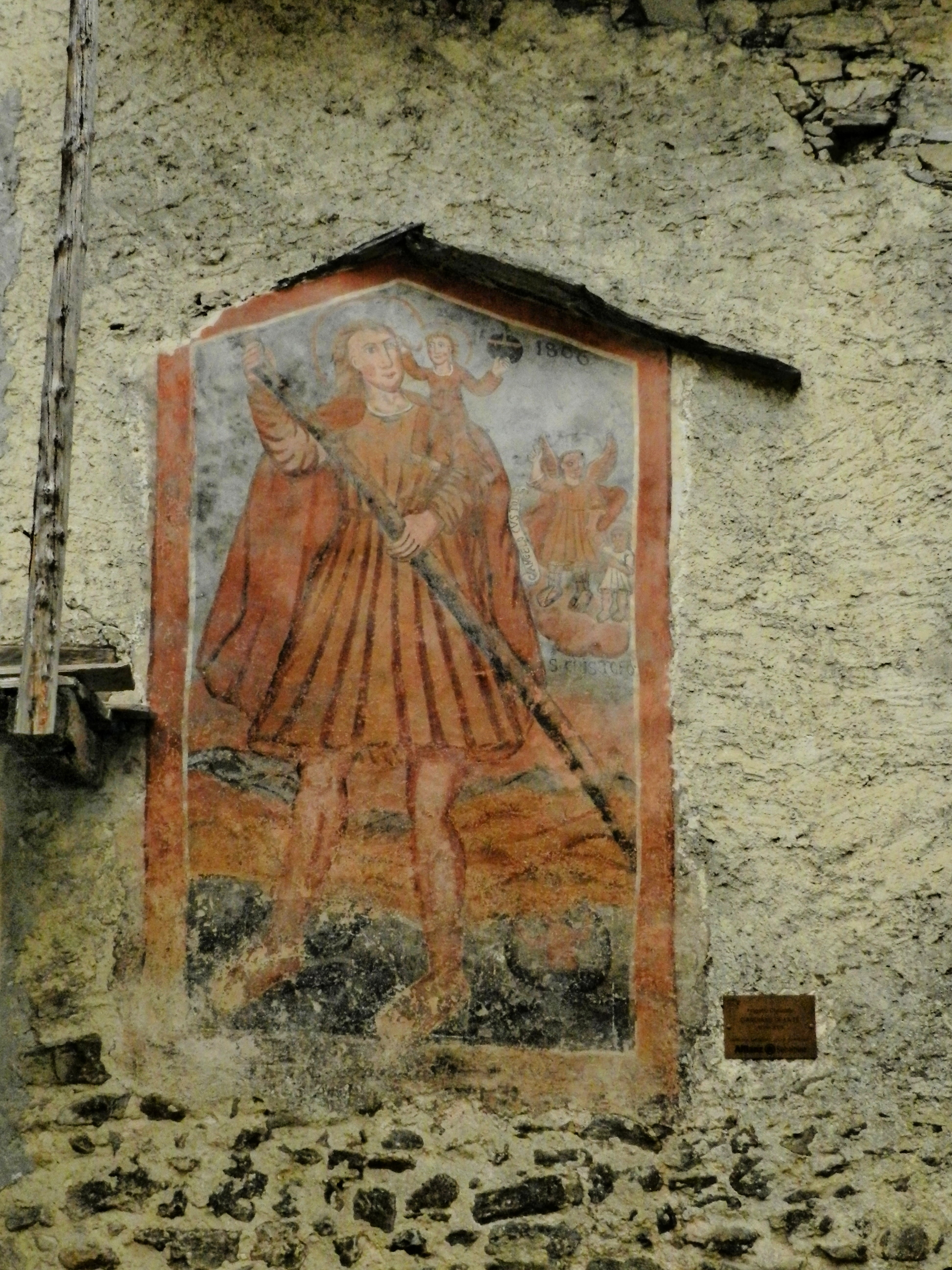 che traghetta un fiume ,Camoglieres, provincia di Cuneo.